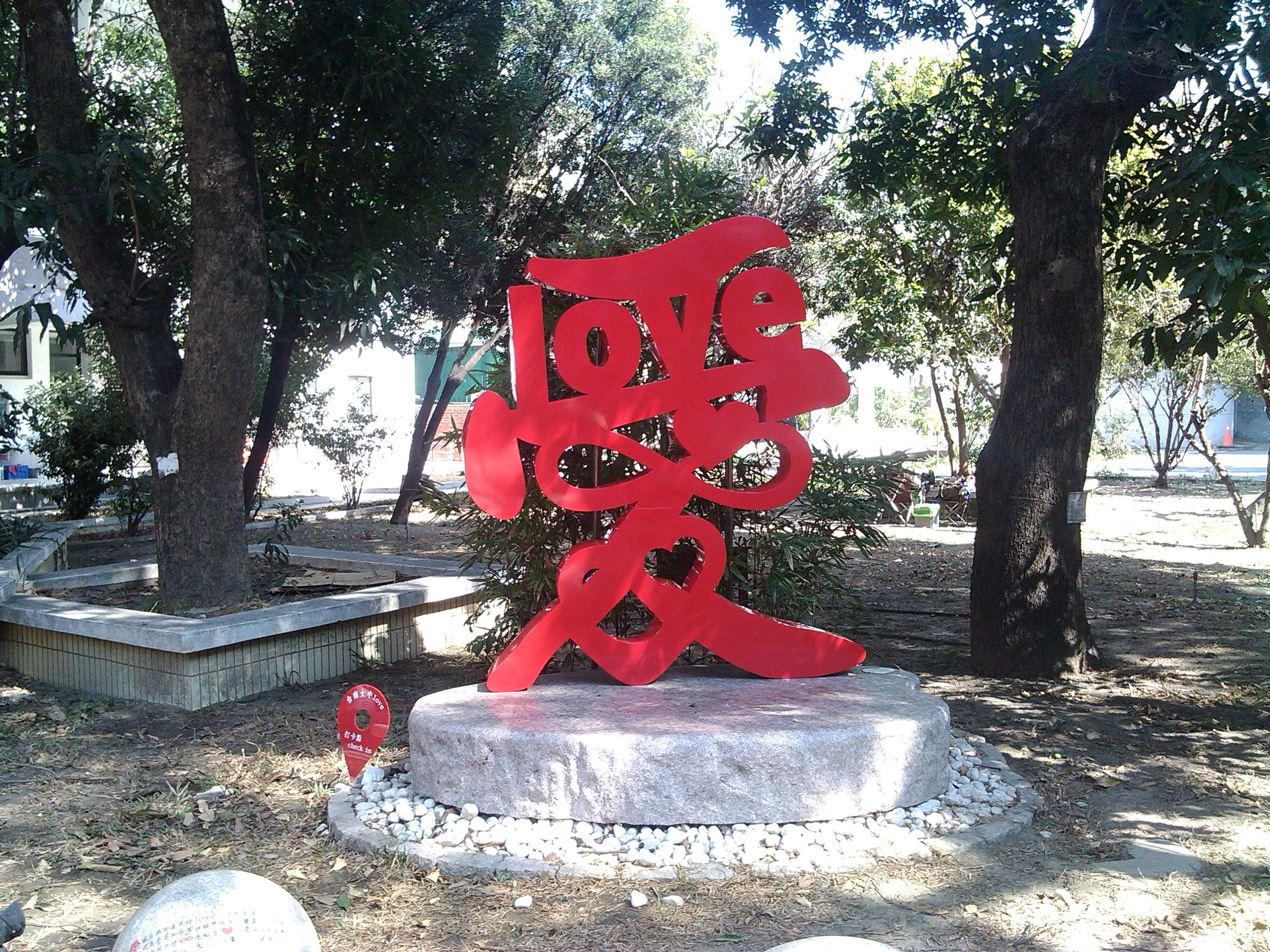 由大埔街學校正門進入 左轉20公尺即可抵達